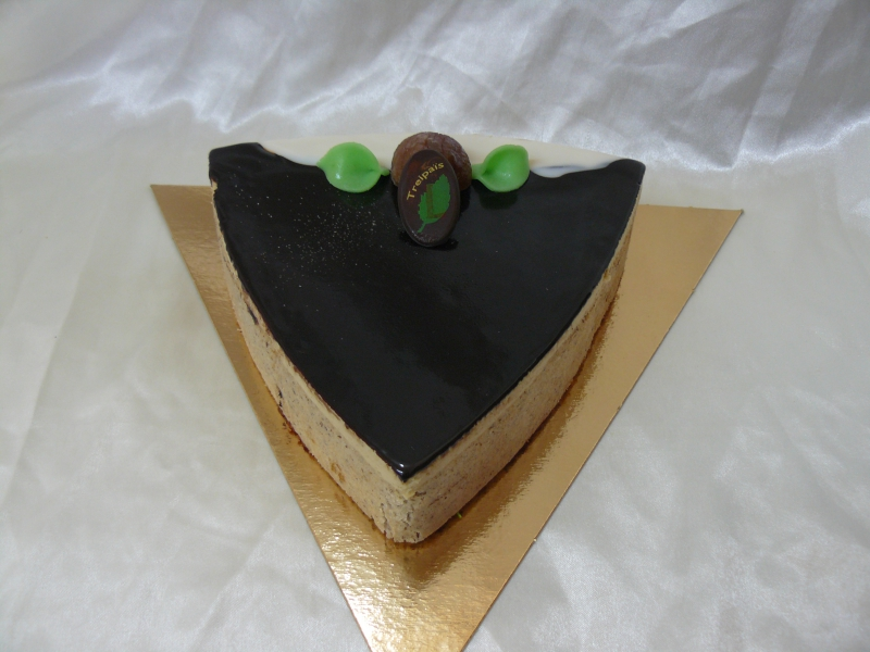 Gâteau, spécialité Limousine, dont le nom signifie "Trois Pays"